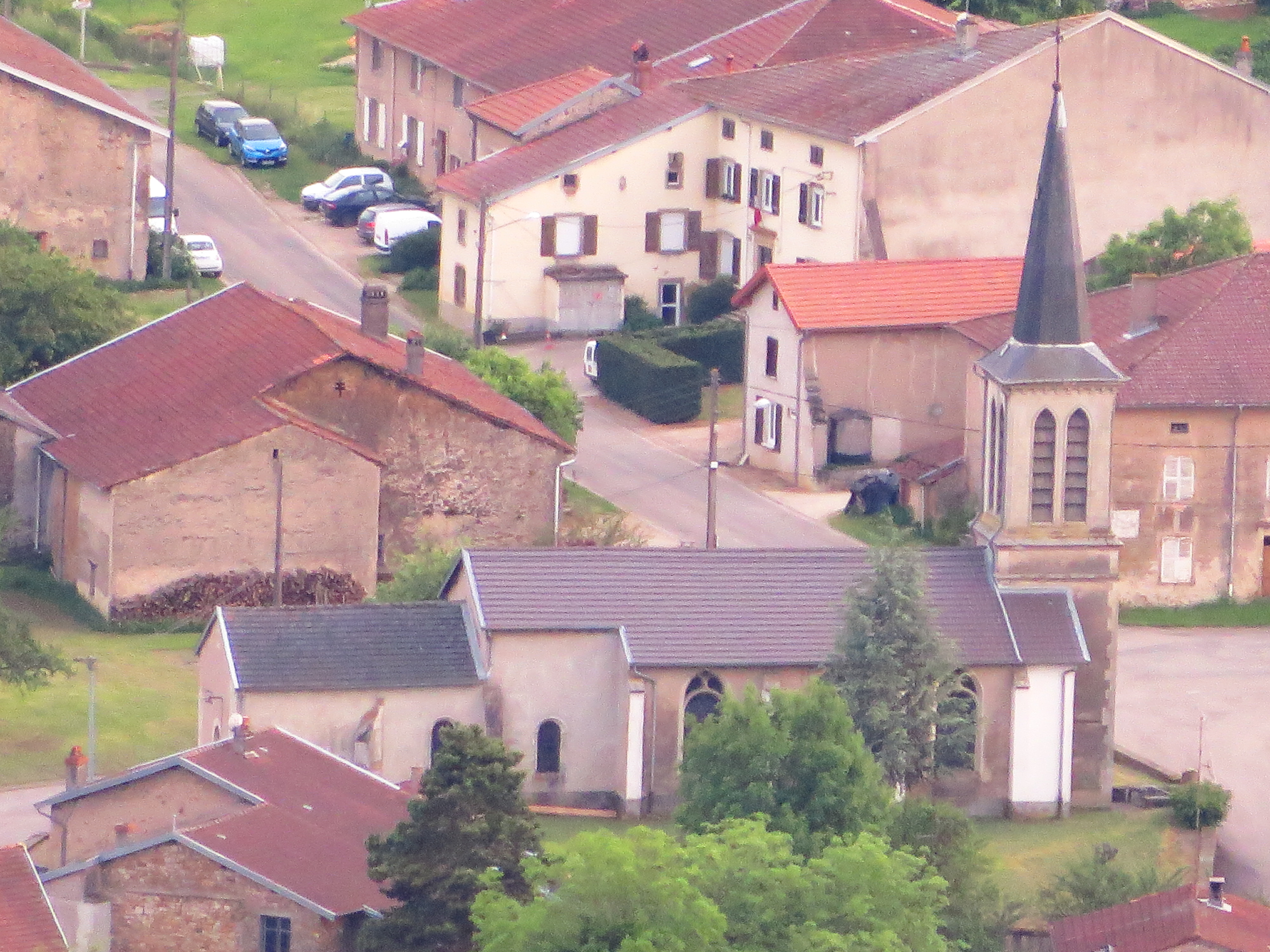 Gugney 54 eglise